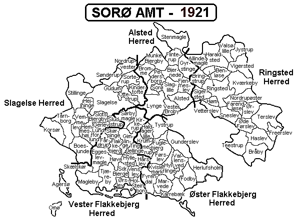 Sorø Amt Denmark. Map by Svend-Erik Christiansen